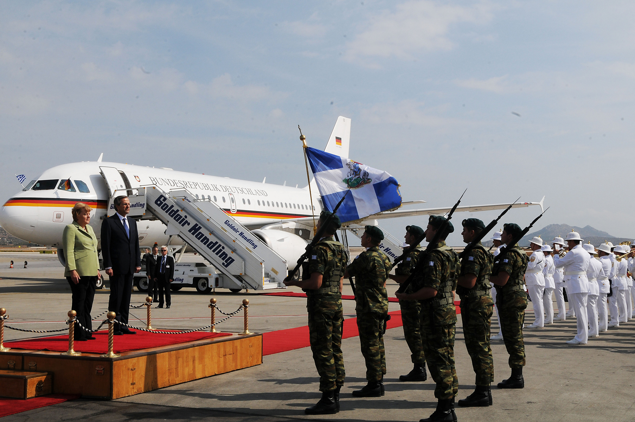 Αντώνης Σαμαράς - Angela Merkel - Επίσκεψη στην Αθήνα